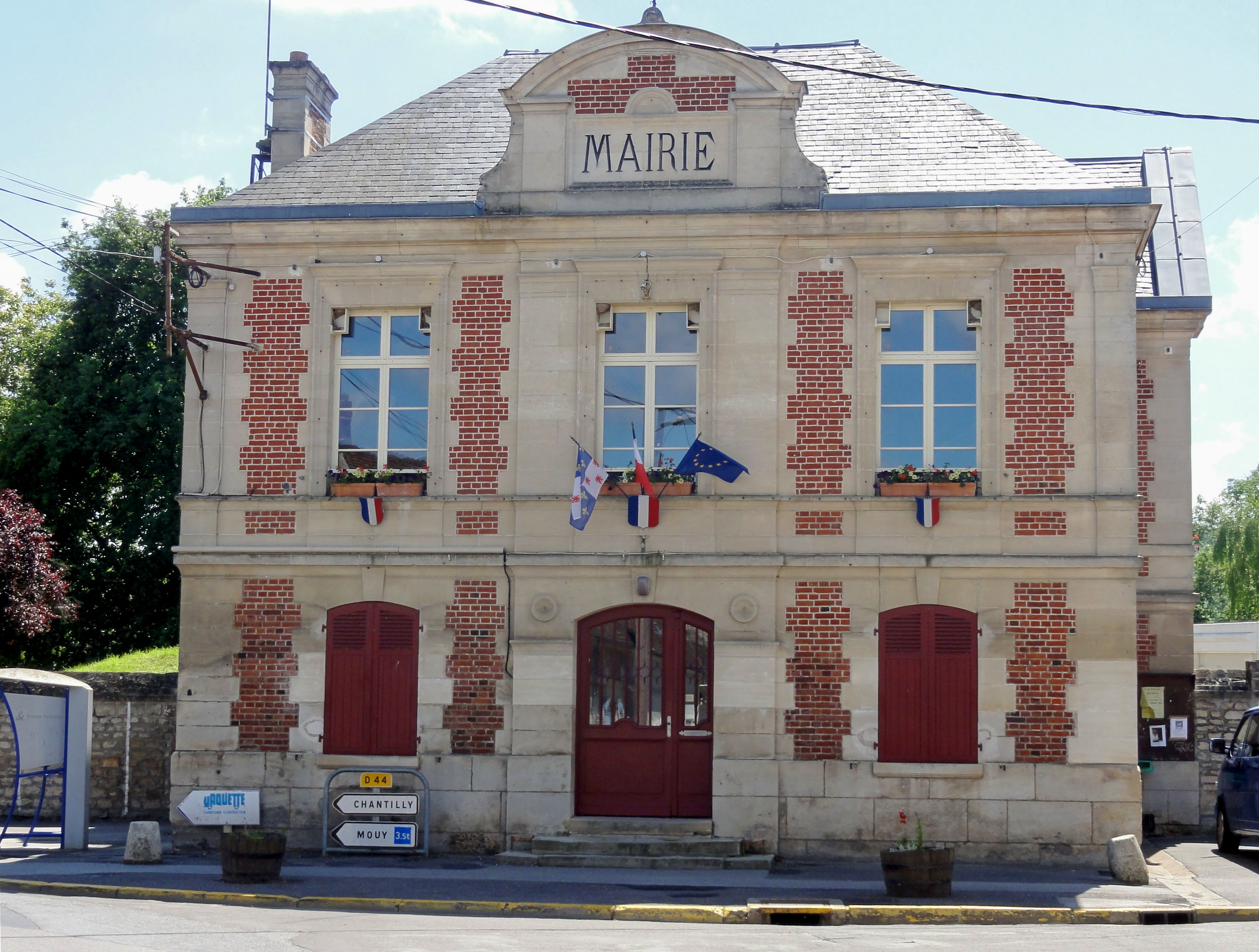 Mairie, Grande-Rue, au carrefour avec la rue de la Gare.